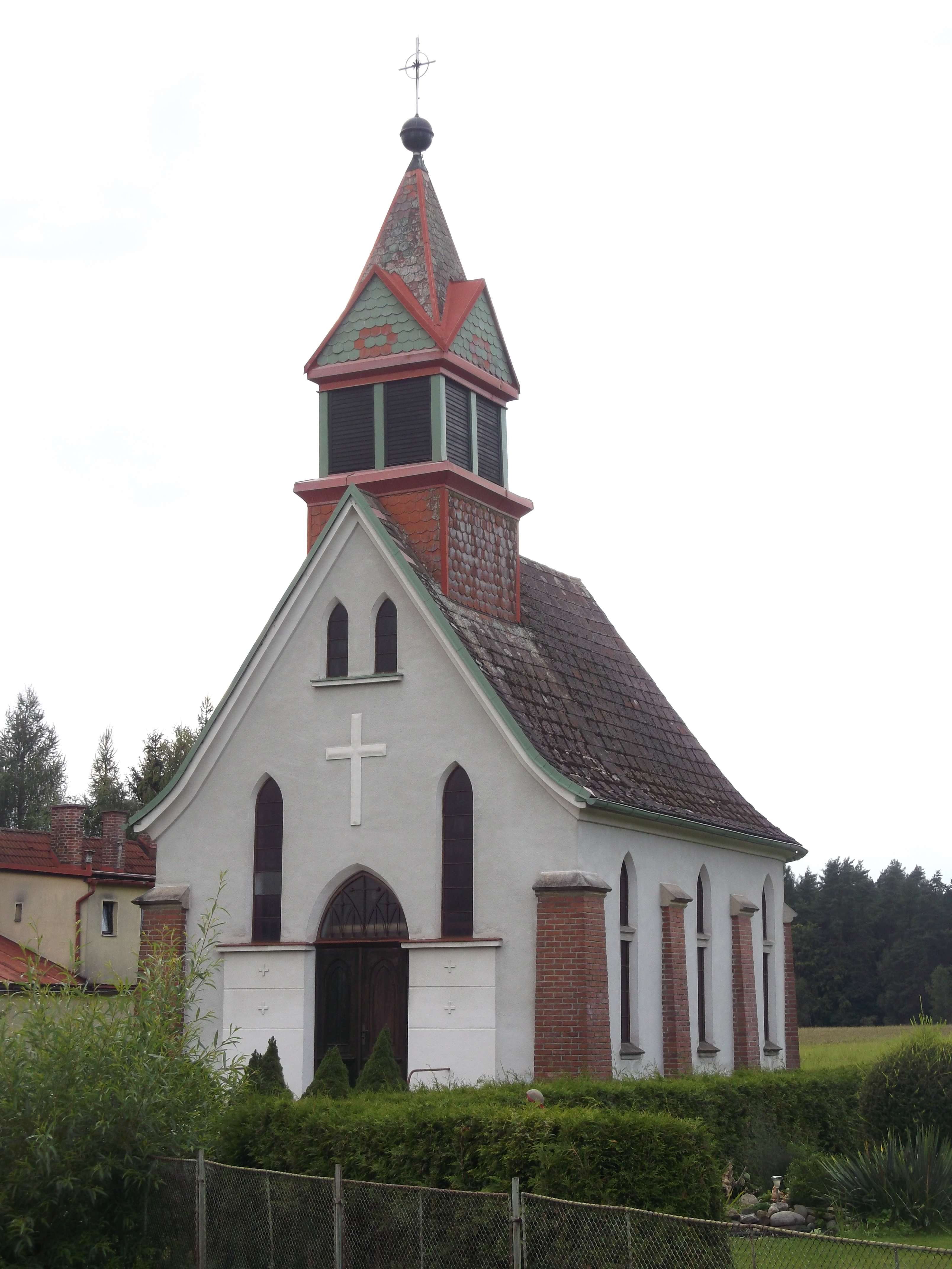 Starobucké Debrné - Kaple Božského Srdce Páně